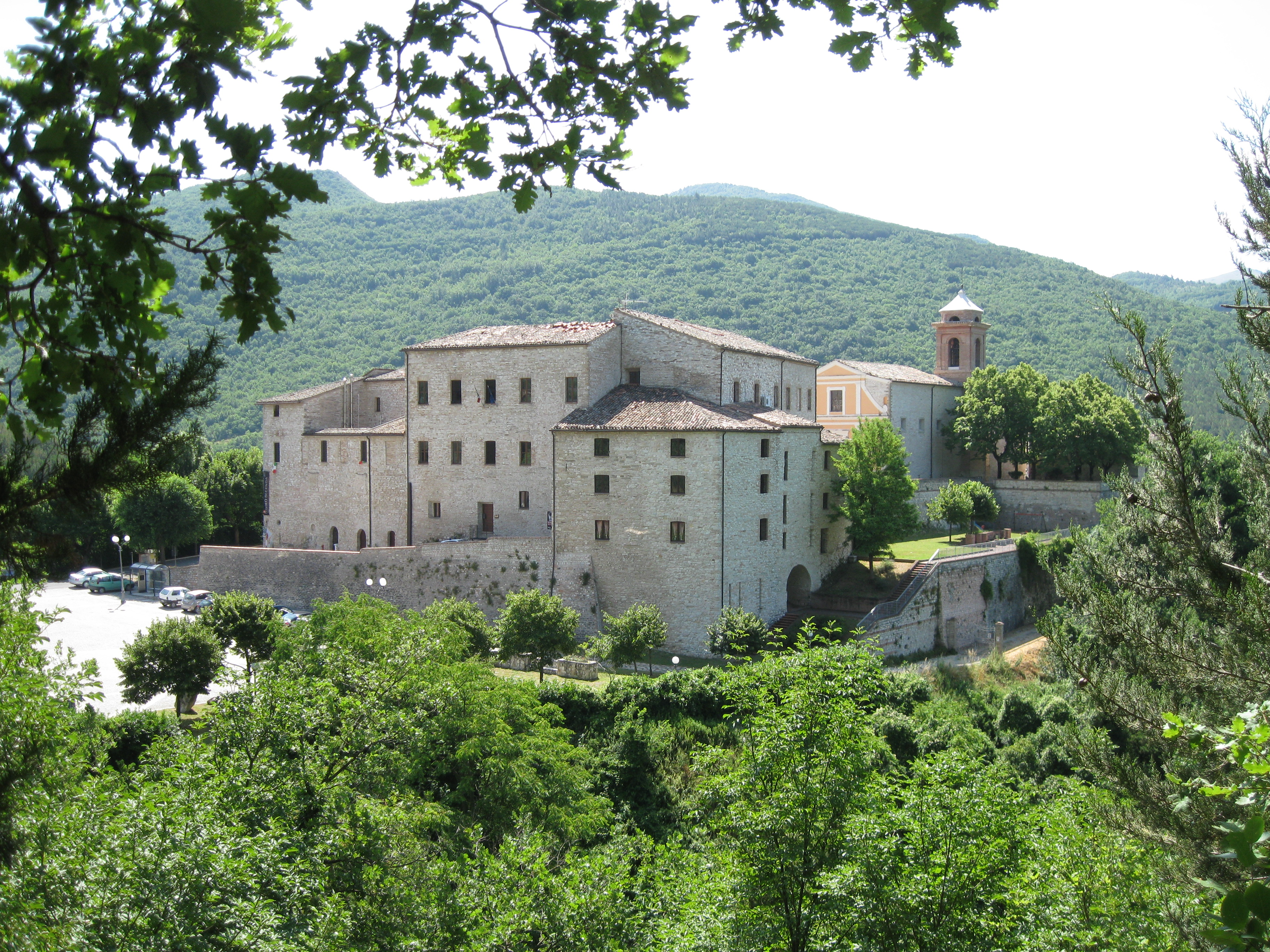 Genga, Italien